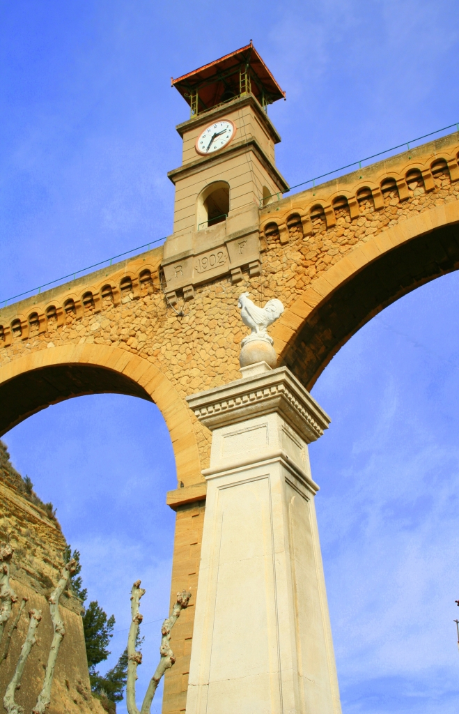 Pont de l'Horloge, Saint-Chamas, France